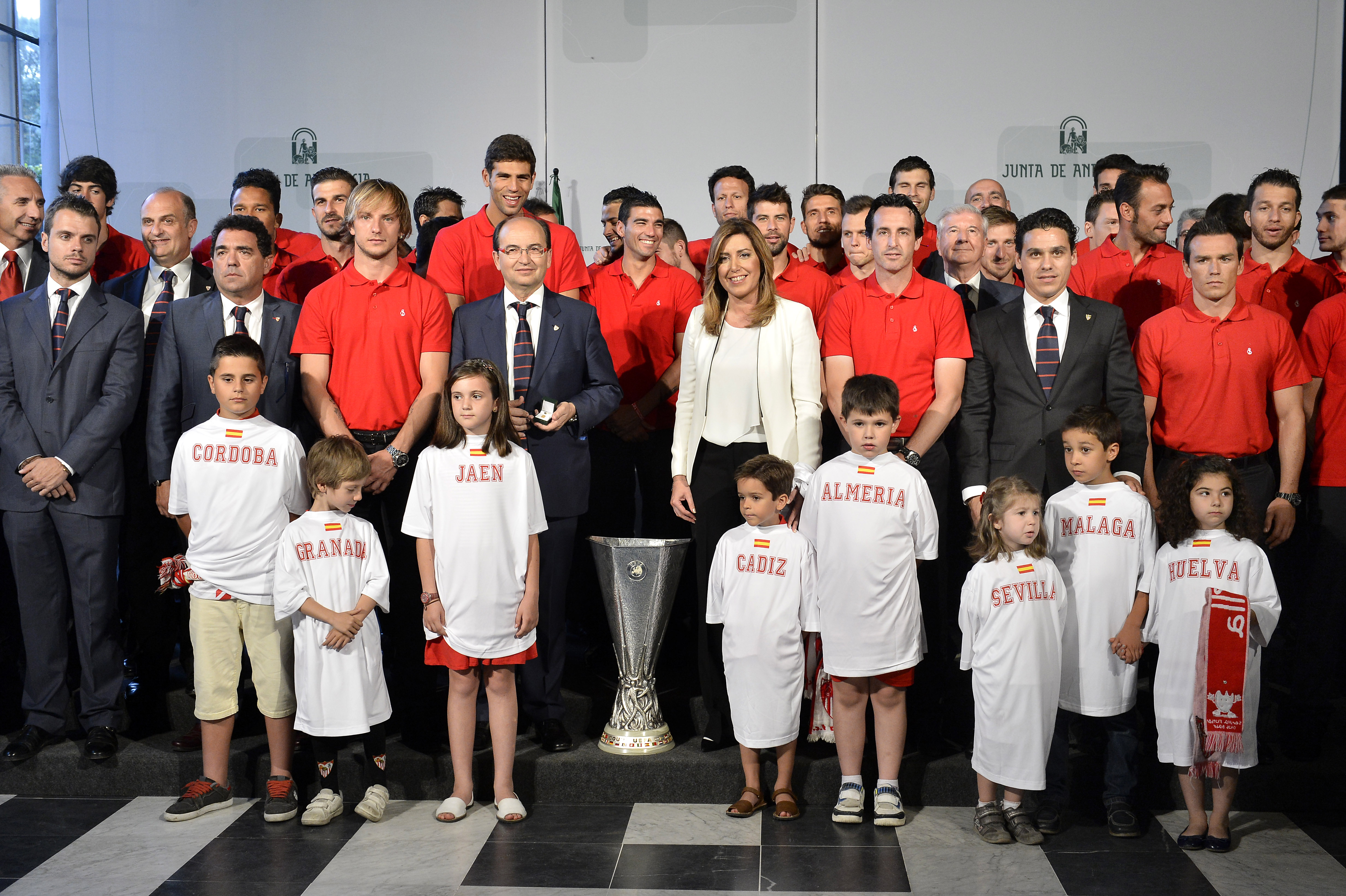 Audiencia de la Copa de la UEFA con Susana Díaz del Sevilla FC